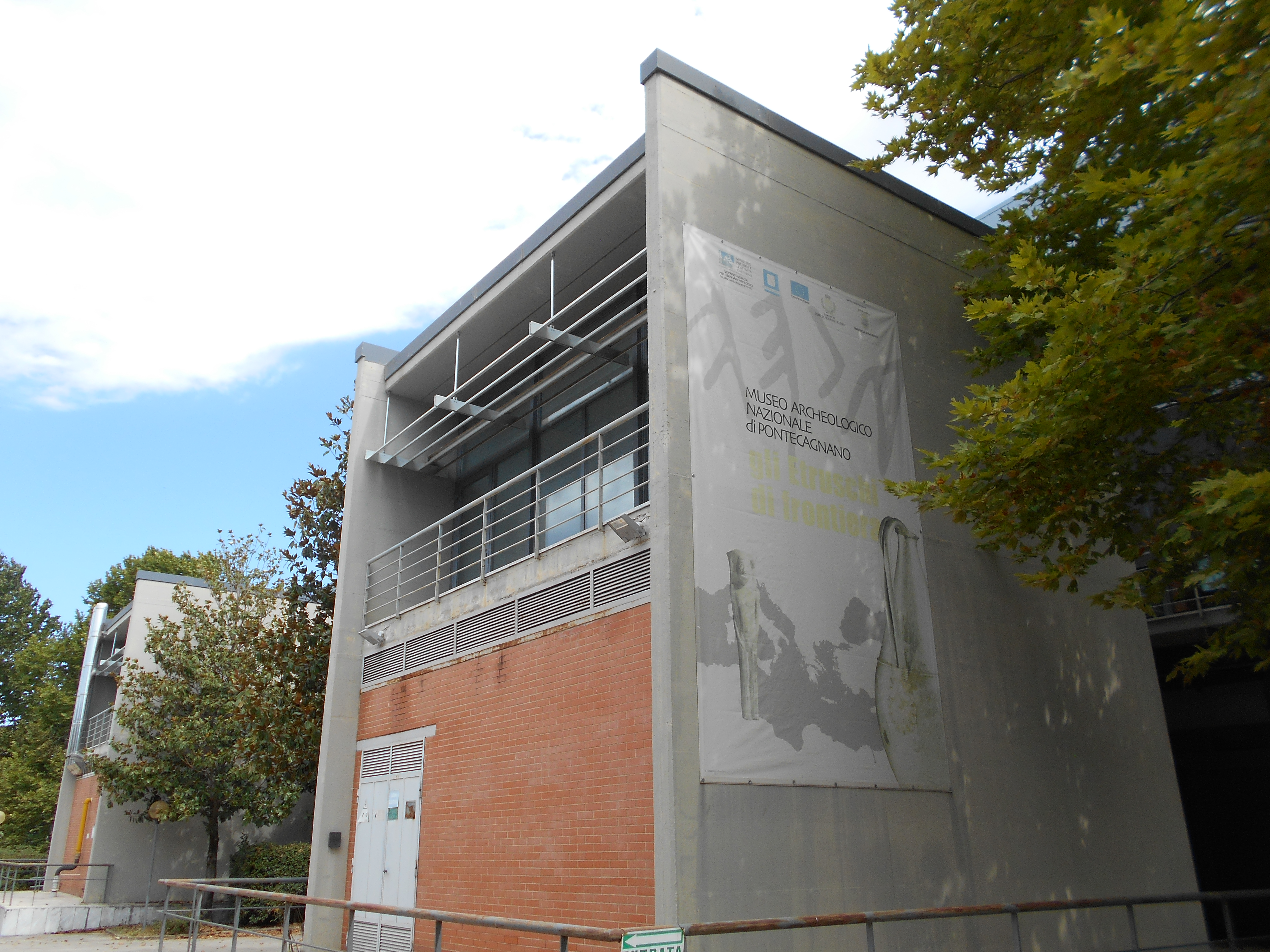 Museo archeologico nazionale di Pontecagnano